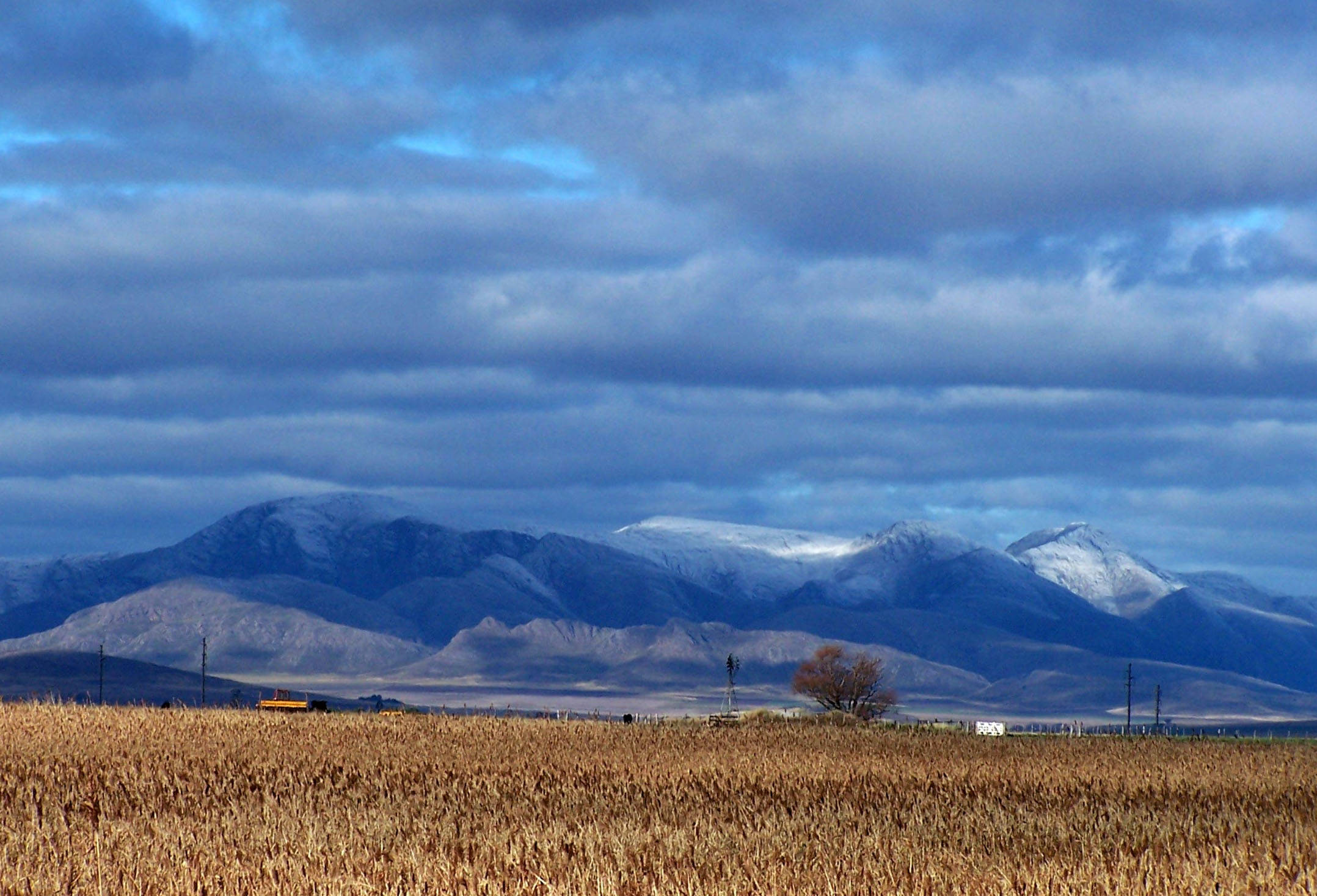 Casa de campo en Cerro Tres Picos (Sierra de la Ventana).